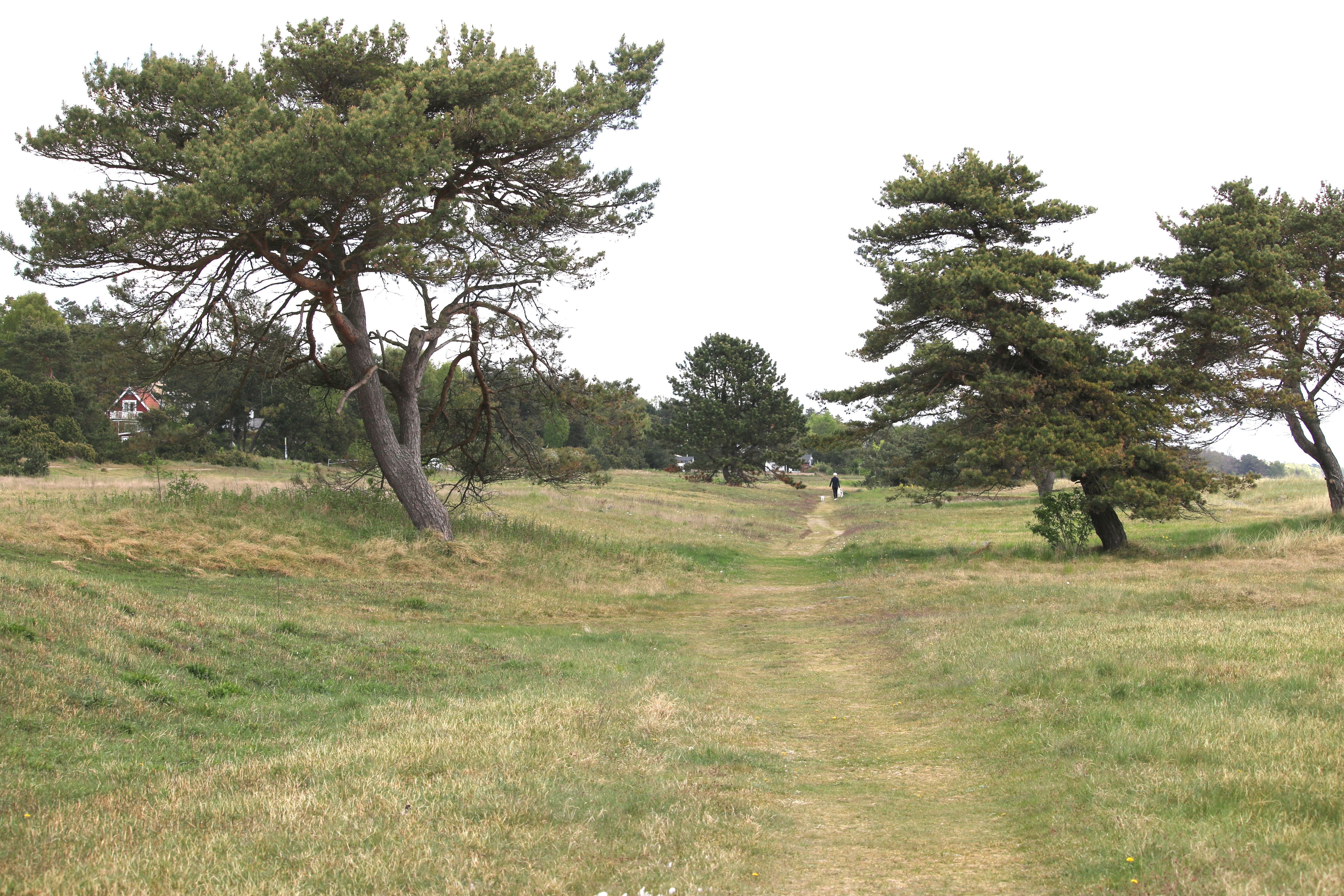 Beddinge strandhed 2016